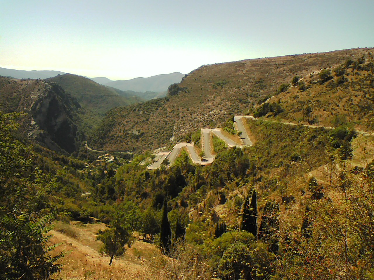 Il Col de Braus